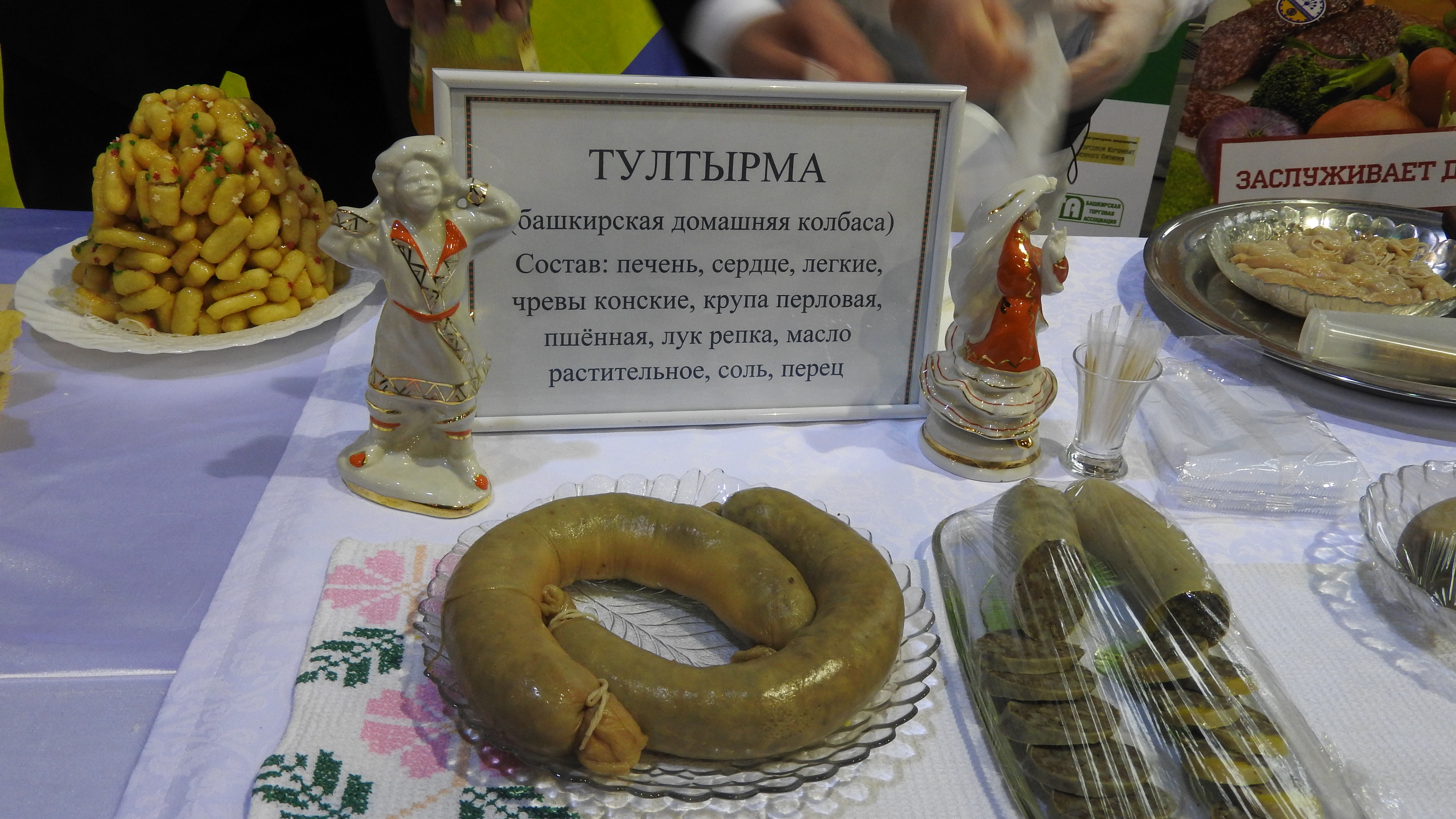 Выставка на ВДНХ ЭКСПО "УФА-ЛАДЬЯ. АРТ.РЕМЕСЛА. СУВЕНИРЫ", Уфа.